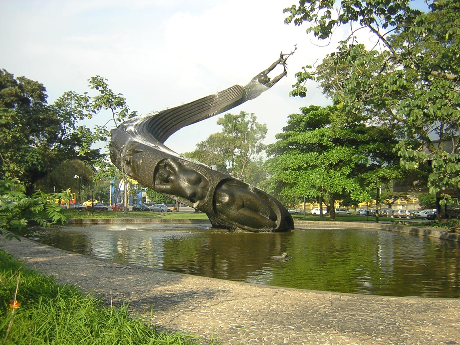 "La Vida", Escultura de Rodrigo Arenas Betancur, 14m de diámetro, 14 m de altura. Plazoleta del edificio Suramericana de Seguros, Medellín, Colombia.